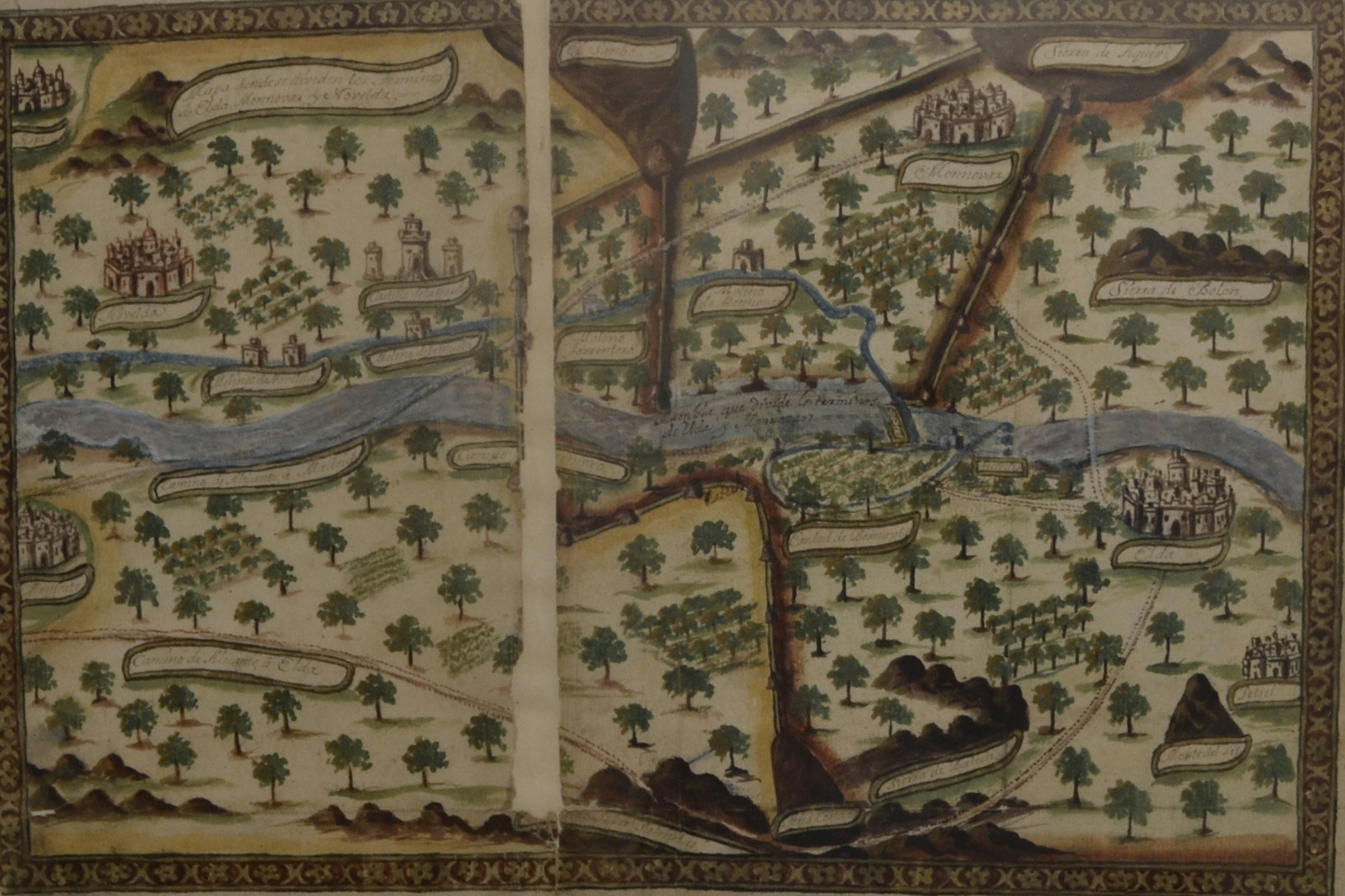 Mapa de la partició de termes entre Elda, Novelda i Monòver (1719). ARV: Mapes i plànols, núm. 251. Arxiu del Regne de València.